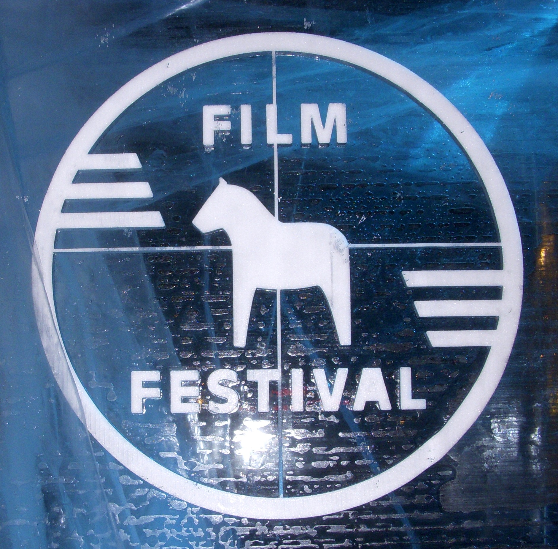 Stockholms Filmfestivals logo i en 10 ton tung is-filmduk i Kungsträdgården